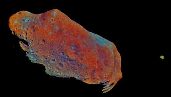 Насыщенное цветное изображение астероида Ида как иллюстрация эффекта космической эрозии